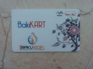 BakıKART - карта, используемая в метро и автобусах с 2015-го года